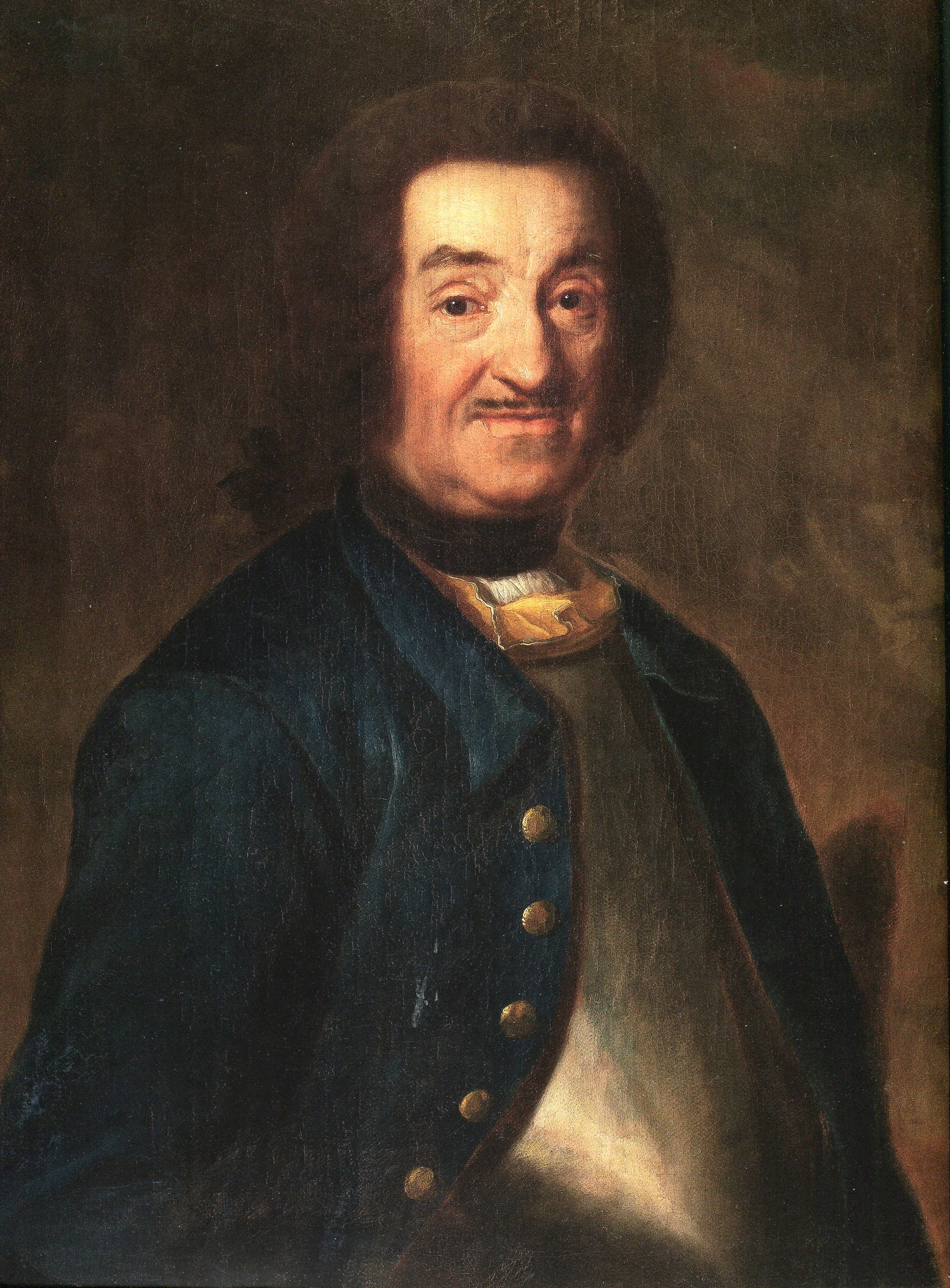 Arkitekt Johan Eberhard Carlberg (1683-1773)